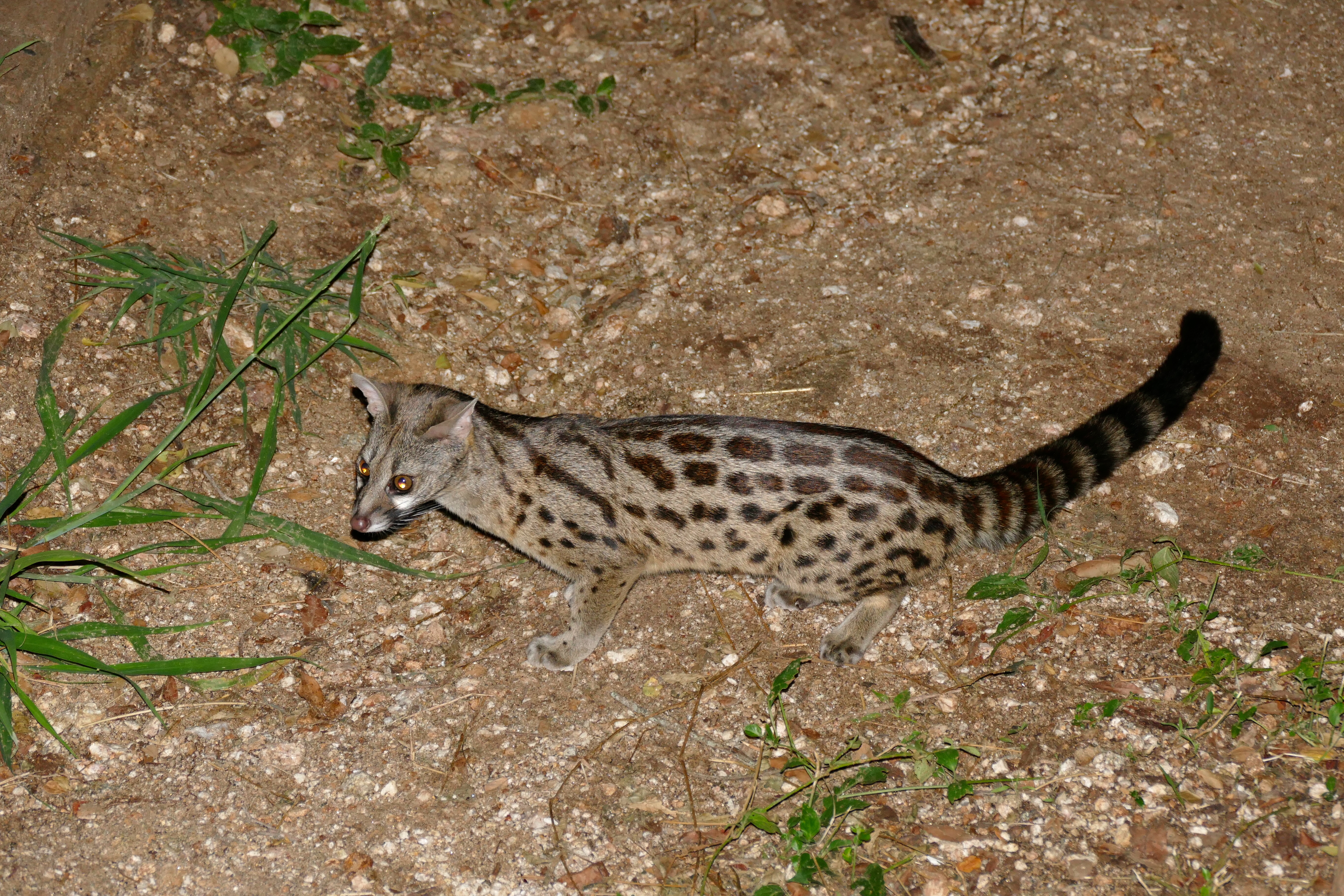 Tamboti Camp, Kruger NP, SOUTH AFRICA